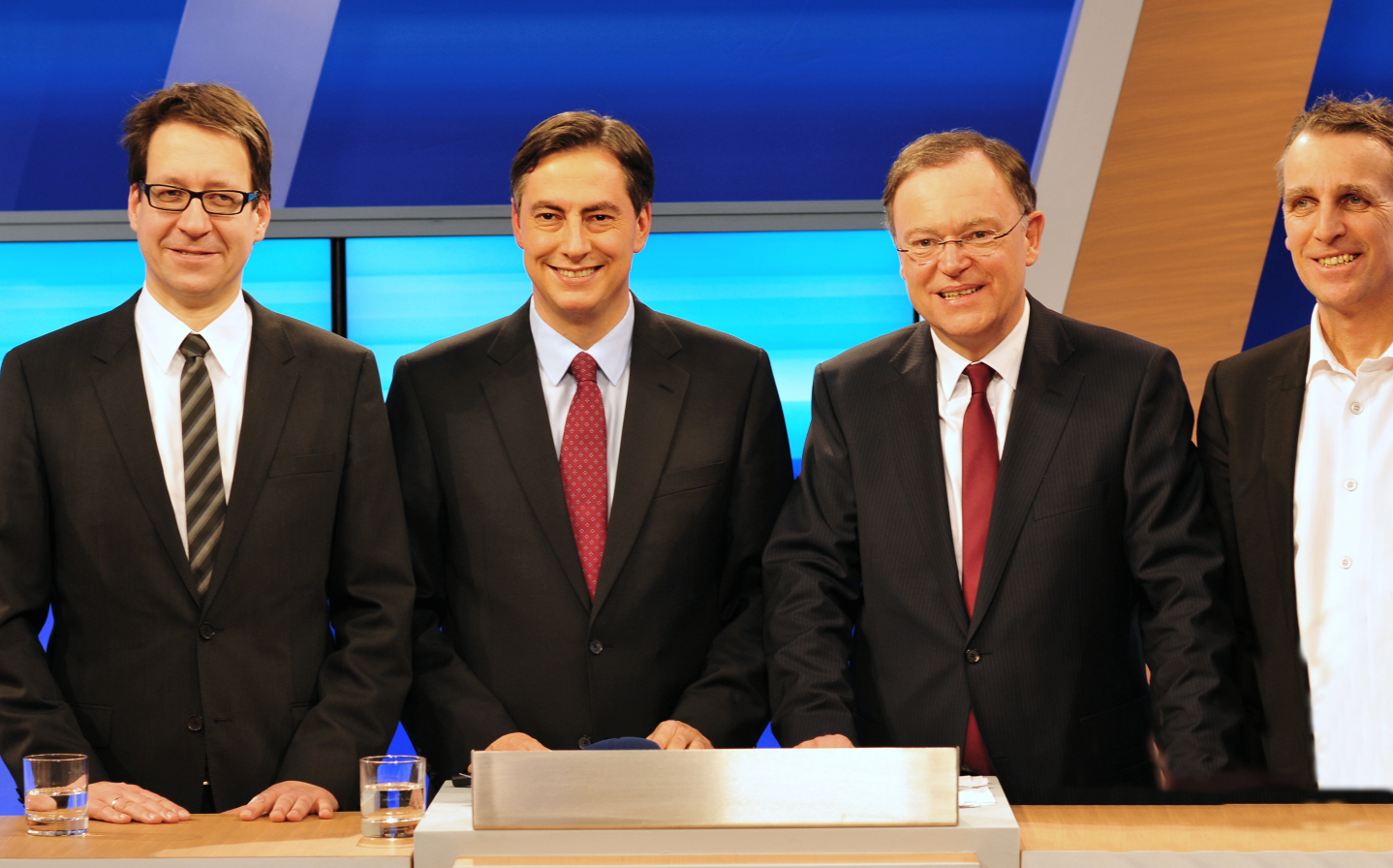 Von links nach recht: Stefan Birkner, David McAallister, Stephan Weil und Stefan Wenzel